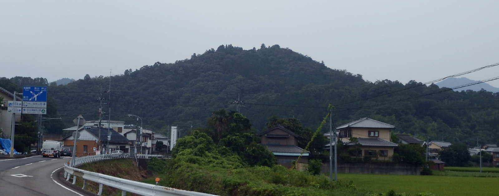 阿波国一宮城の山